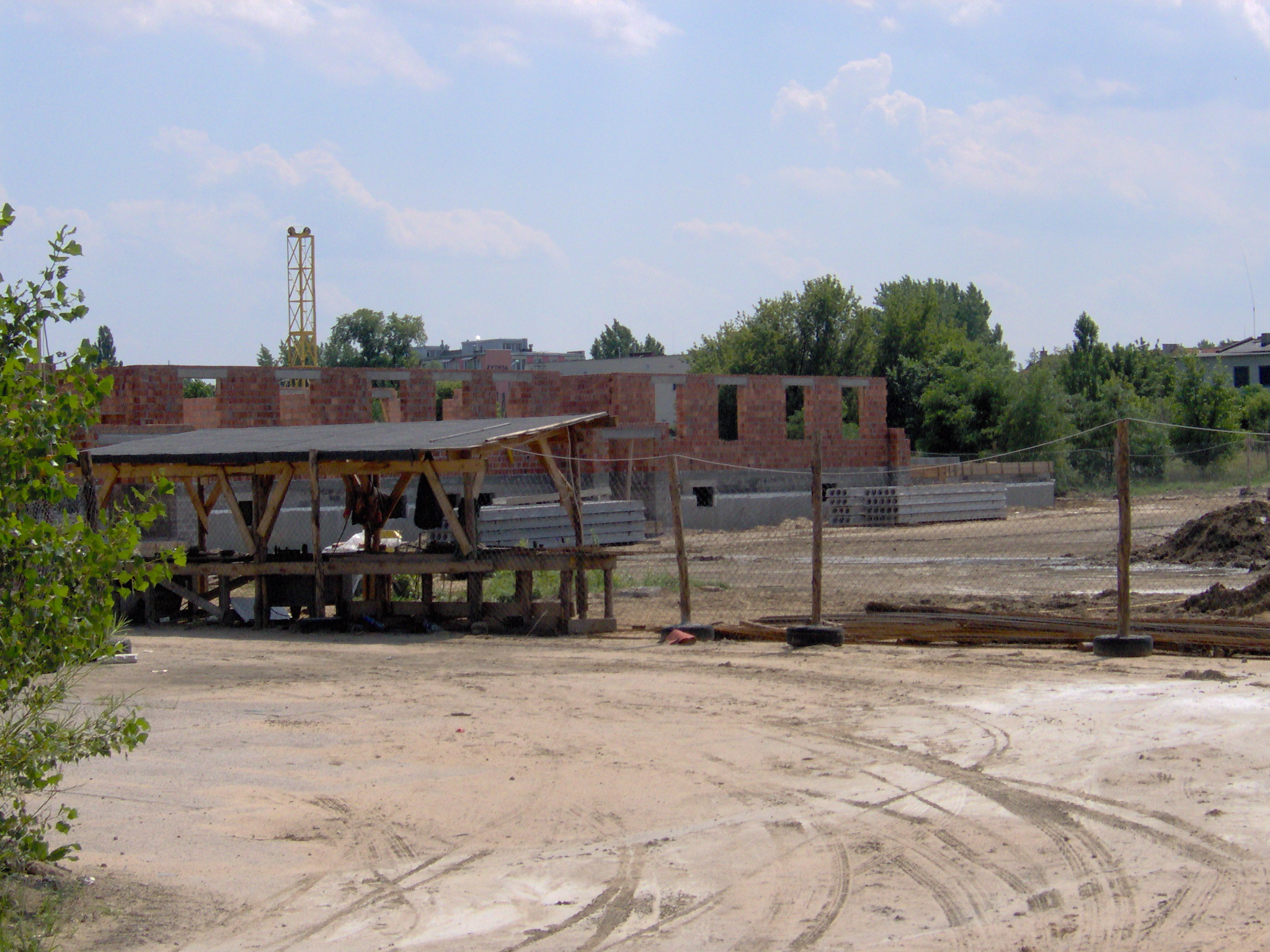 Budowa bloków przy ul. Celulozowej (2007 r.)